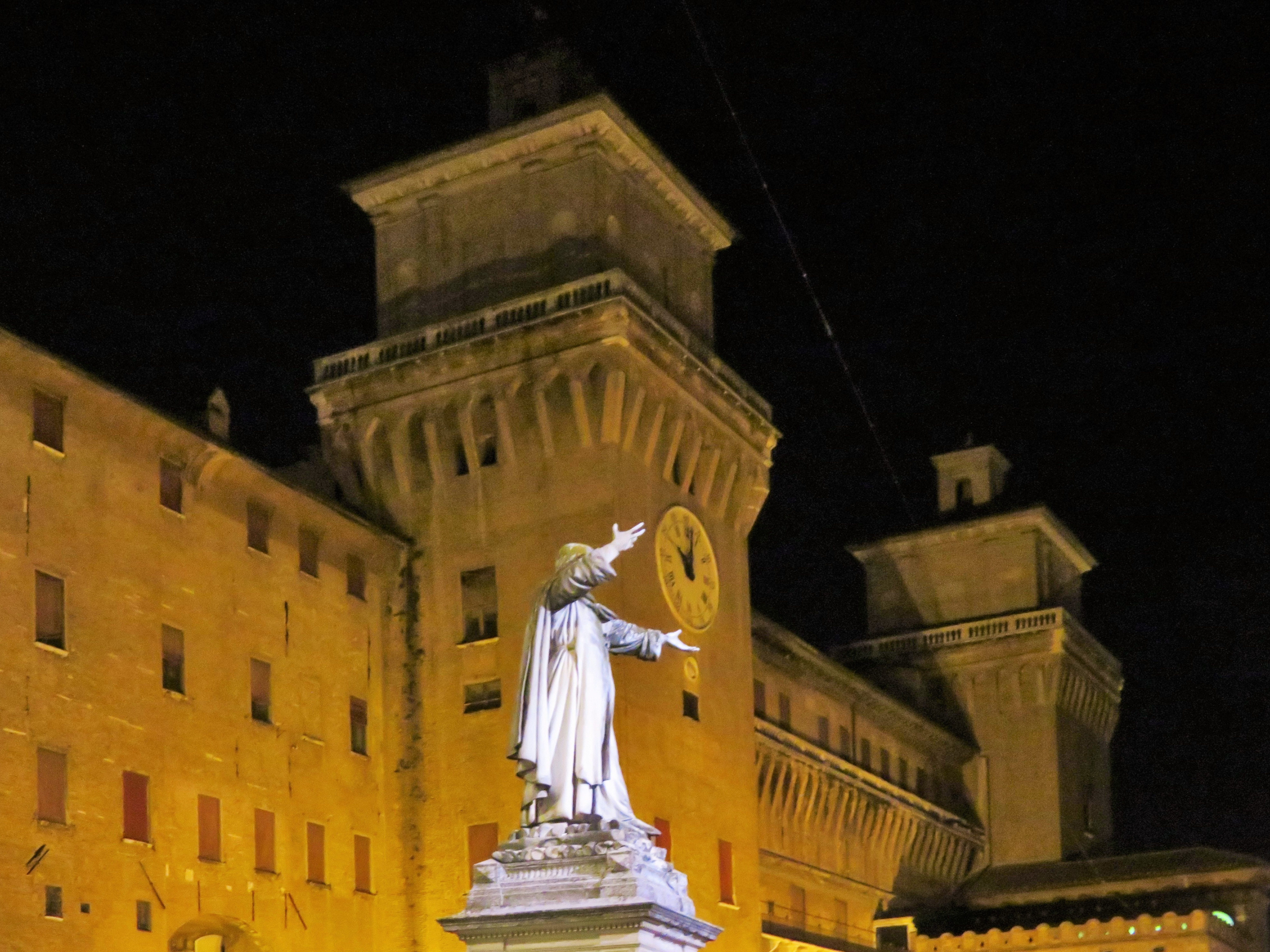 Statua di Girolamo Savonarola in Piazza Savonarola, a Ferrara, in una tipica inquadratura. Il frate sembra tenere tra le mani l'orologio posto sulla torre Marchesana del Castello Estense.